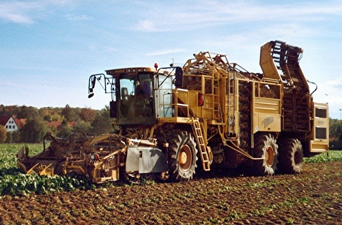 ROPA-Rübenroder Tiger, selbstfahrender Rübenvollernter von schräg vorn